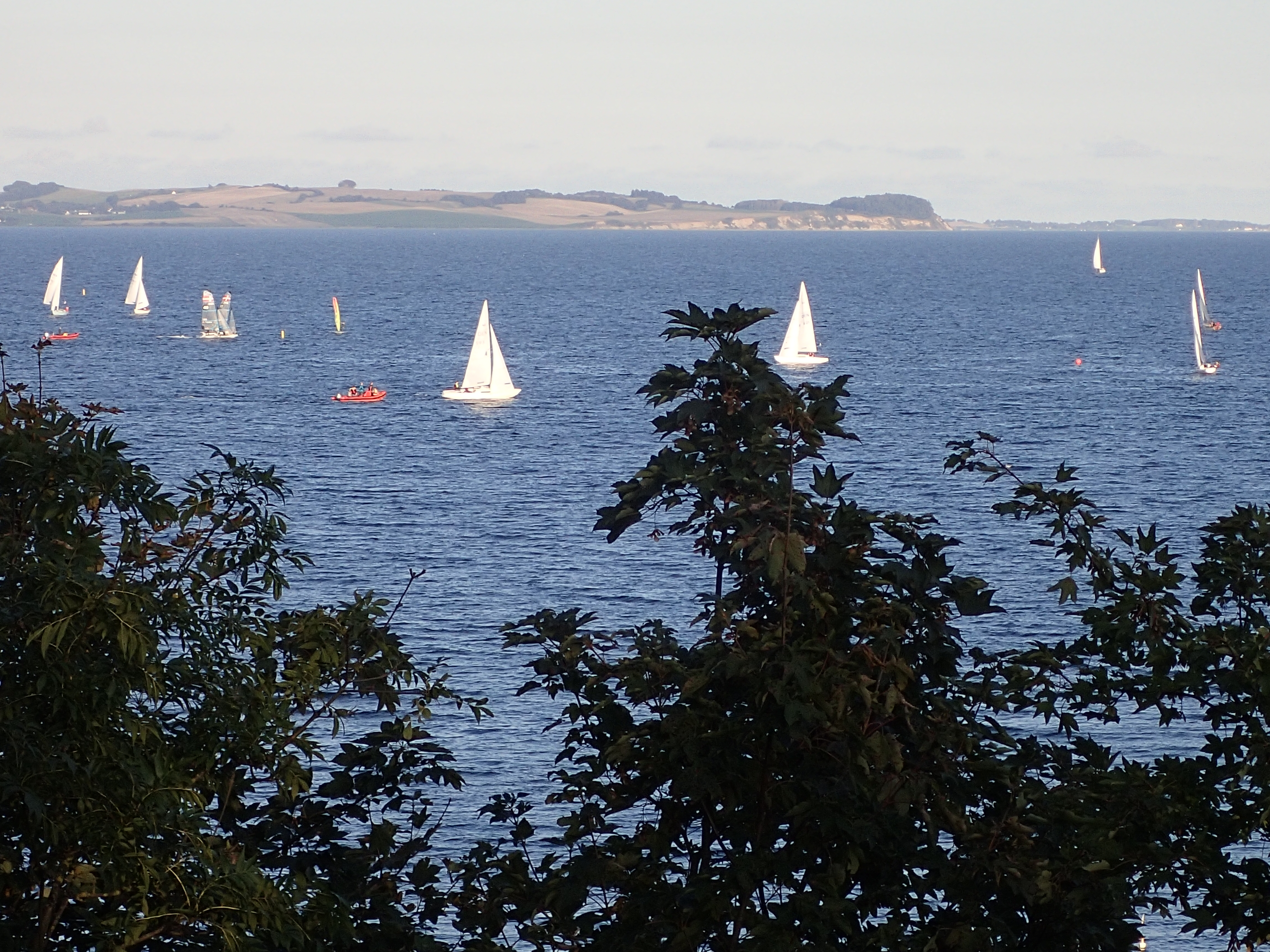 Aarhus-bugten set fra Skovtoften. Udsigt til Mols Hoved.